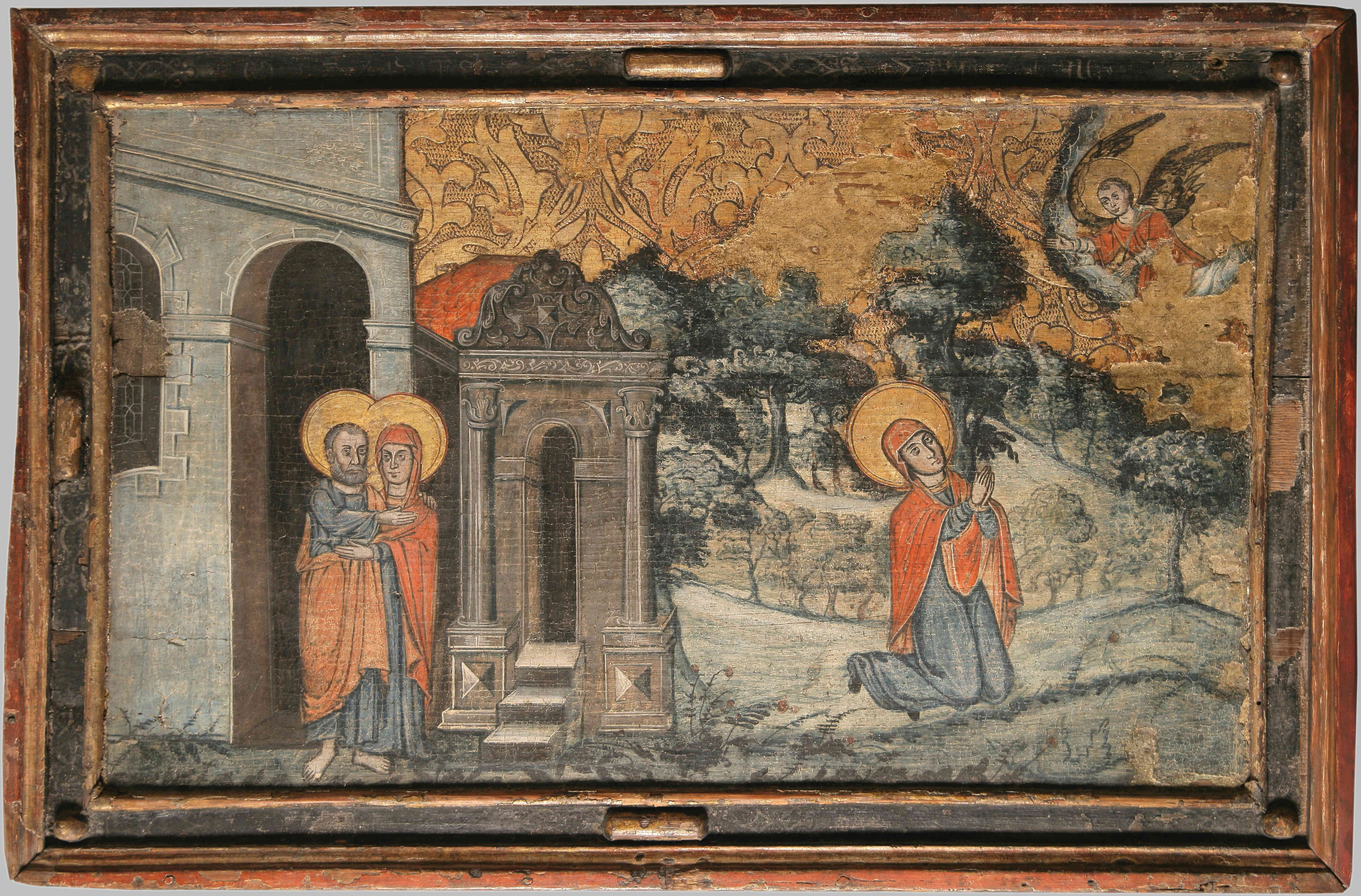 Маларыцкі майстар. Цалаванне Іакіма і Ганны. Благавесце Ганне. 1648-1650. Дошка, яечная тэмпера. 68х100х4.